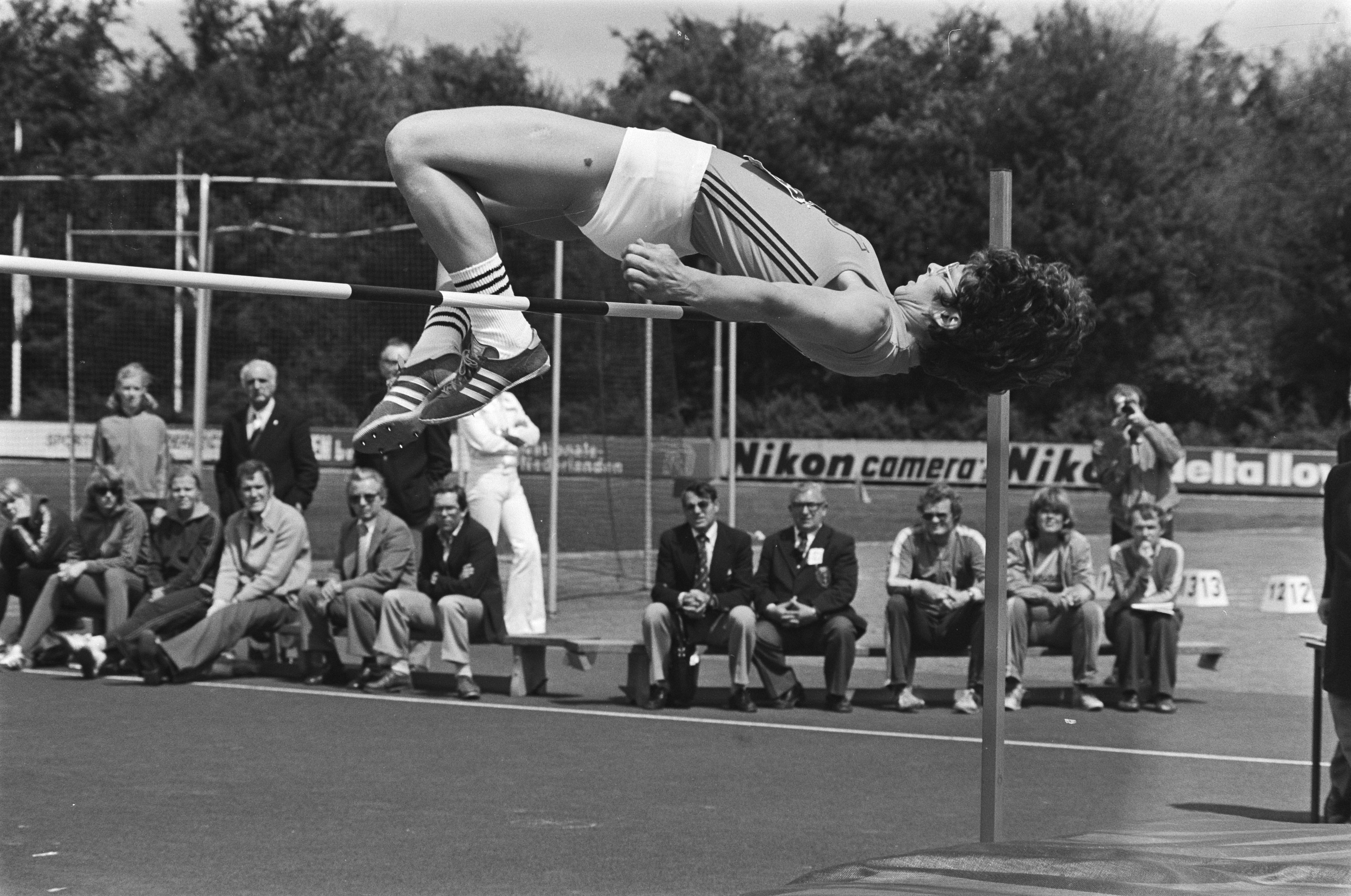 Collectie / Archief : Fotocollectie Anefo Reportage / Serie : [ onbekend ] Beschrijving : Voorronden Europa Cup Atletiek tienkamp heren, vijfkamp dames; Mirjam van Laar tijdens hoogspringen en evenaart Nederlands record Datum : 31 juli 1977 Trefwoorden : ATLETIEK, HOOGSPRINGEN Instellingsnaam : Europa Cup Fotograaf : Suyk, Koen / Anefo Auteursrechthebbende : Nationaal Archief Materiaalsoort : Negatief (zwart/wit) Nummer archiefinventaris : bekijk toegang 2.24.01.05 Bestanddeelnummer : 929-2878